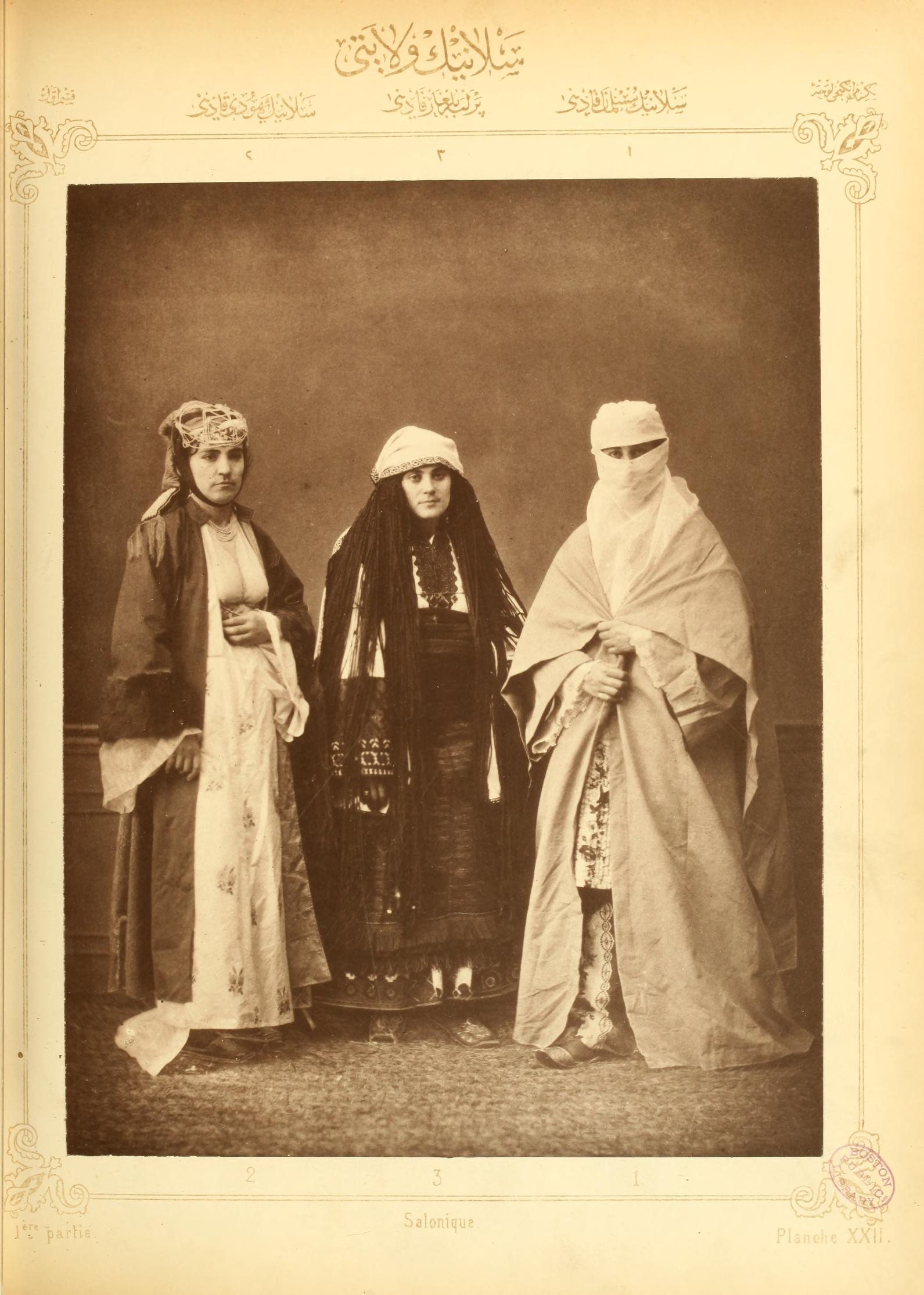 VILAYET DE SELANIK PLANCHE XXII: Dame musulmane de Sèlanik Dame juive de Sèlanik Femme bulgare de Perlèpè